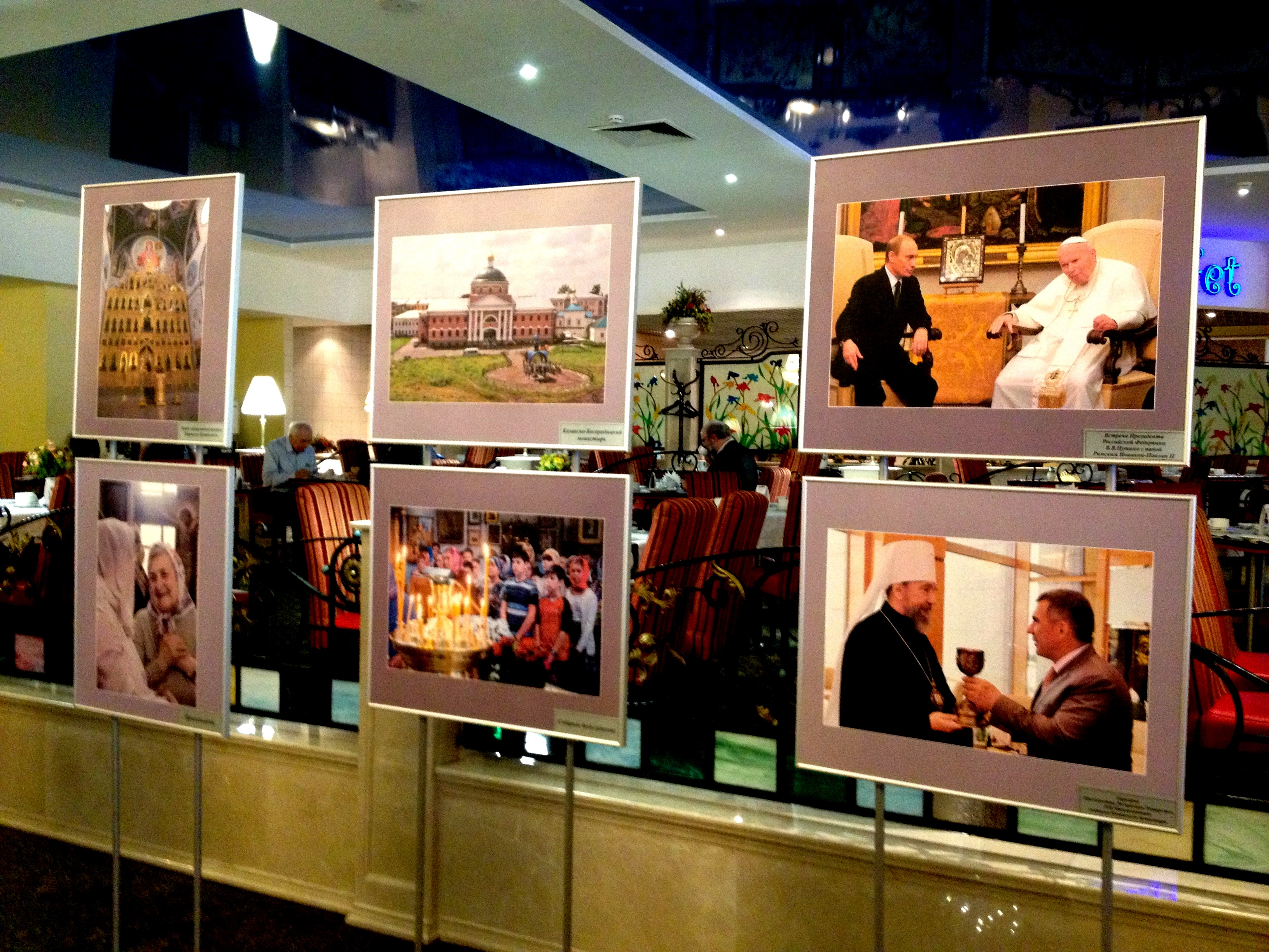 Фотовыставка, приуроченная к I Форуму православной общественности Республики Татарстан.